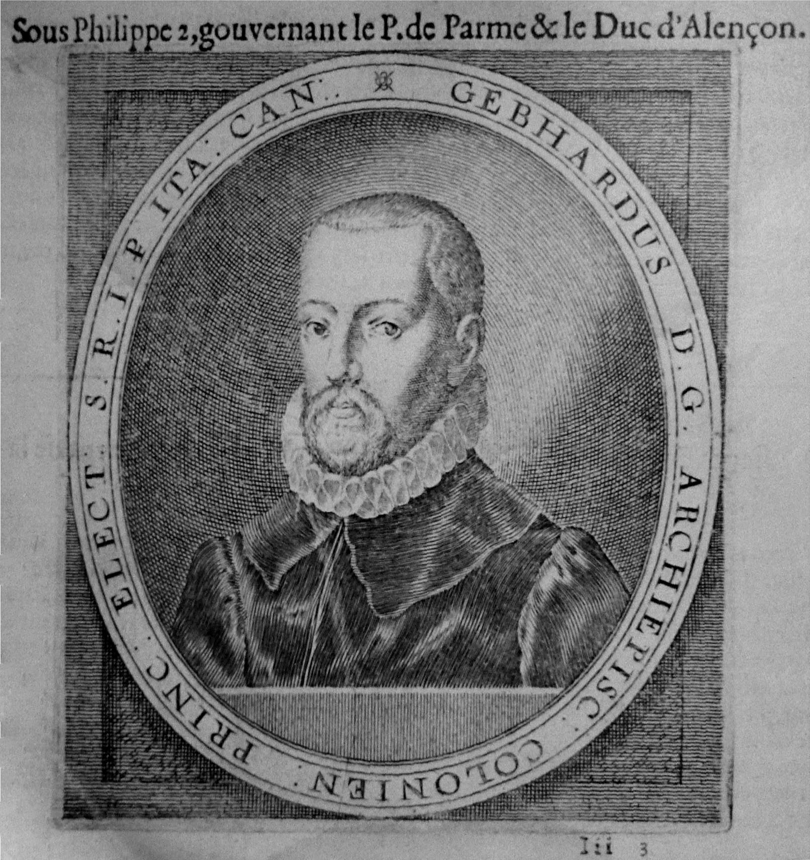 Gebhard von Köln (Haus Waldburg); Darstellung aus der Ausstellung Burg Waldburg